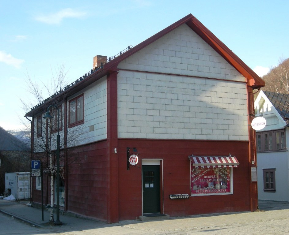 Sel baptistkirke på Otta